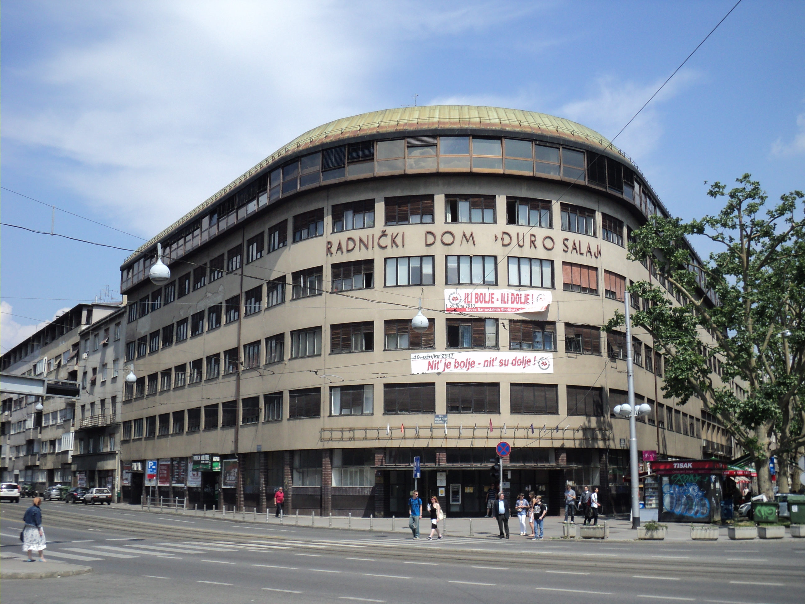 Radnički dom "Đuro Salaj", Zagreb. Self-made. Maj 2011.